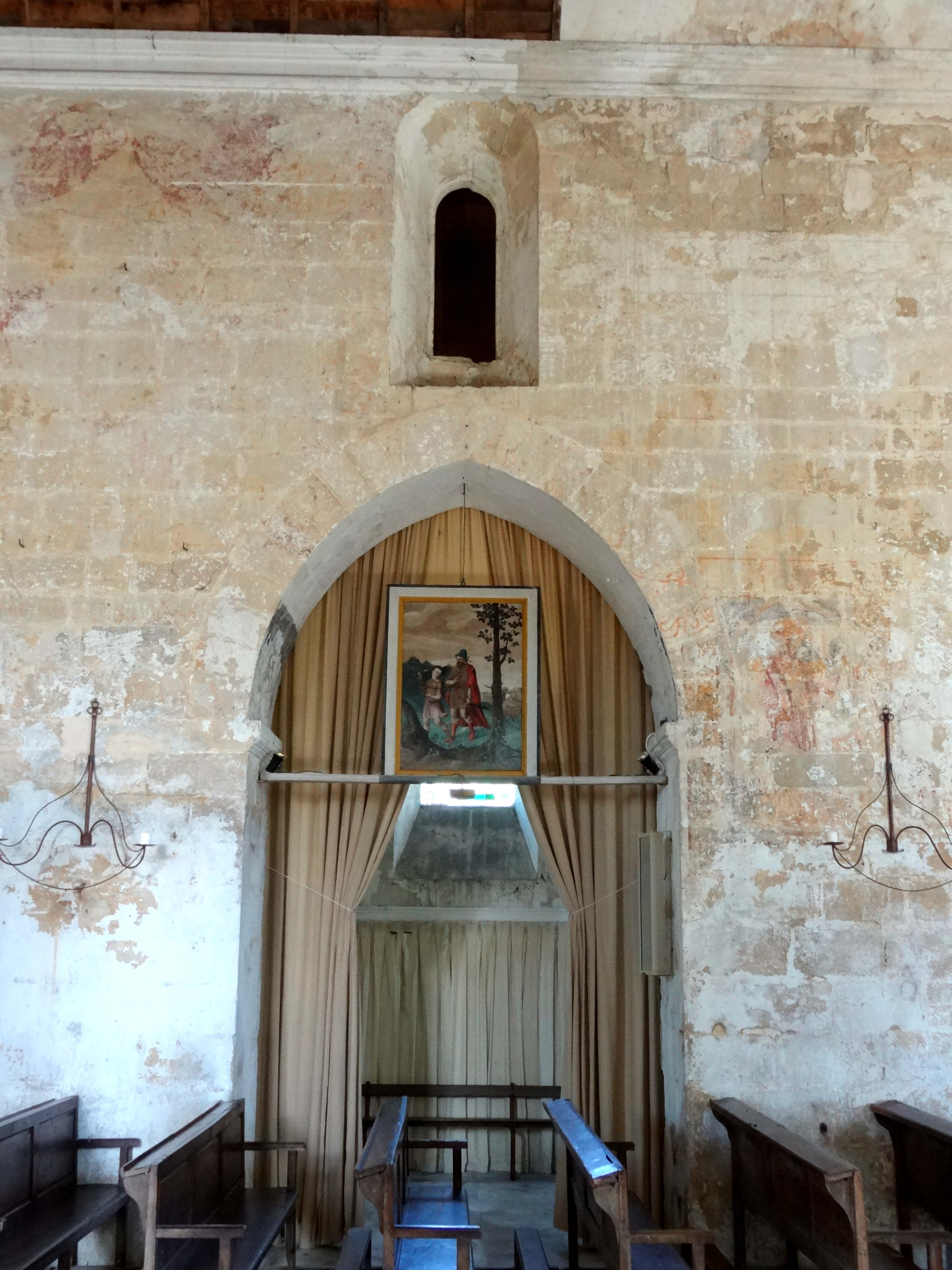 Intérieur de l'église - voir titre.